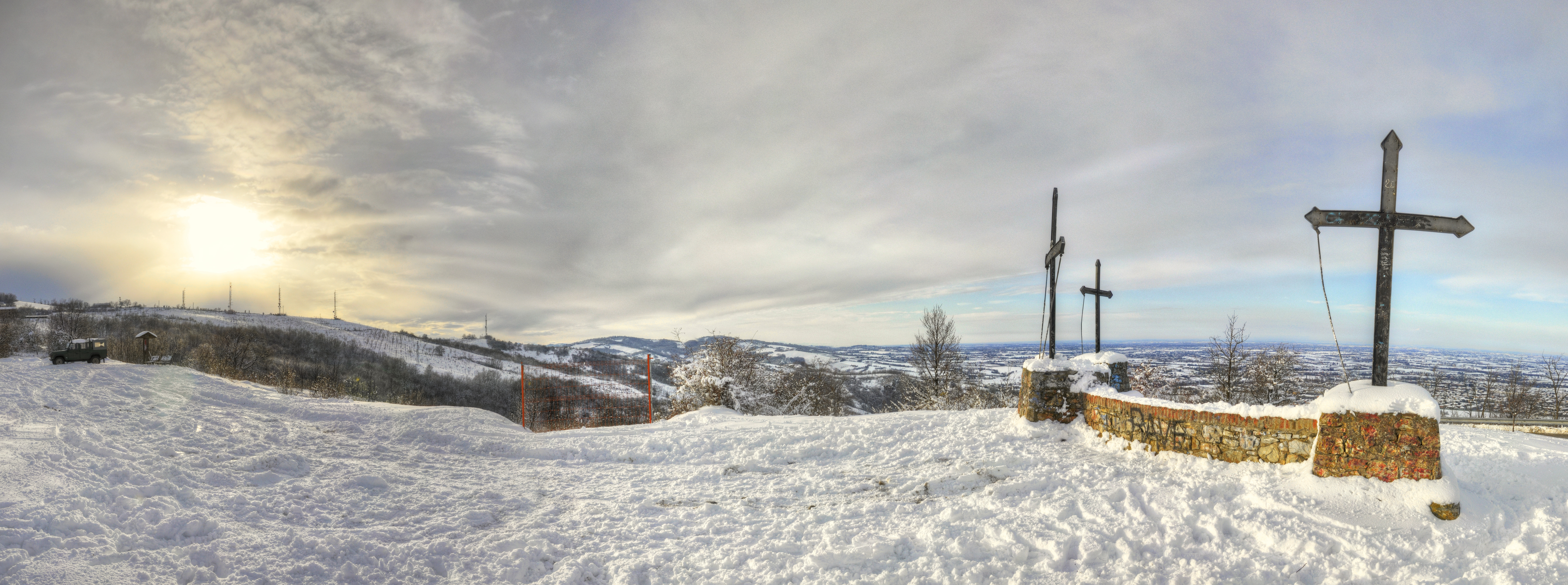 Monte delle Tre Croci - Scandiano, Reggio Emilia, Italia